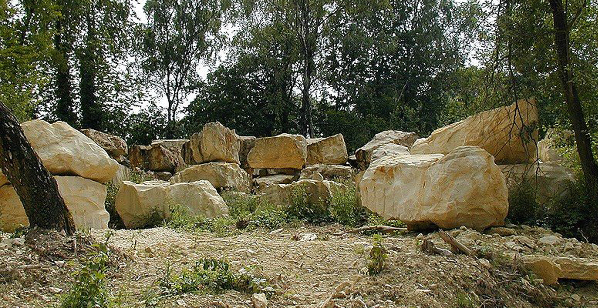 Rohblöcke Baumberger Sandstein im Steinbruch Fark, Havixbeck